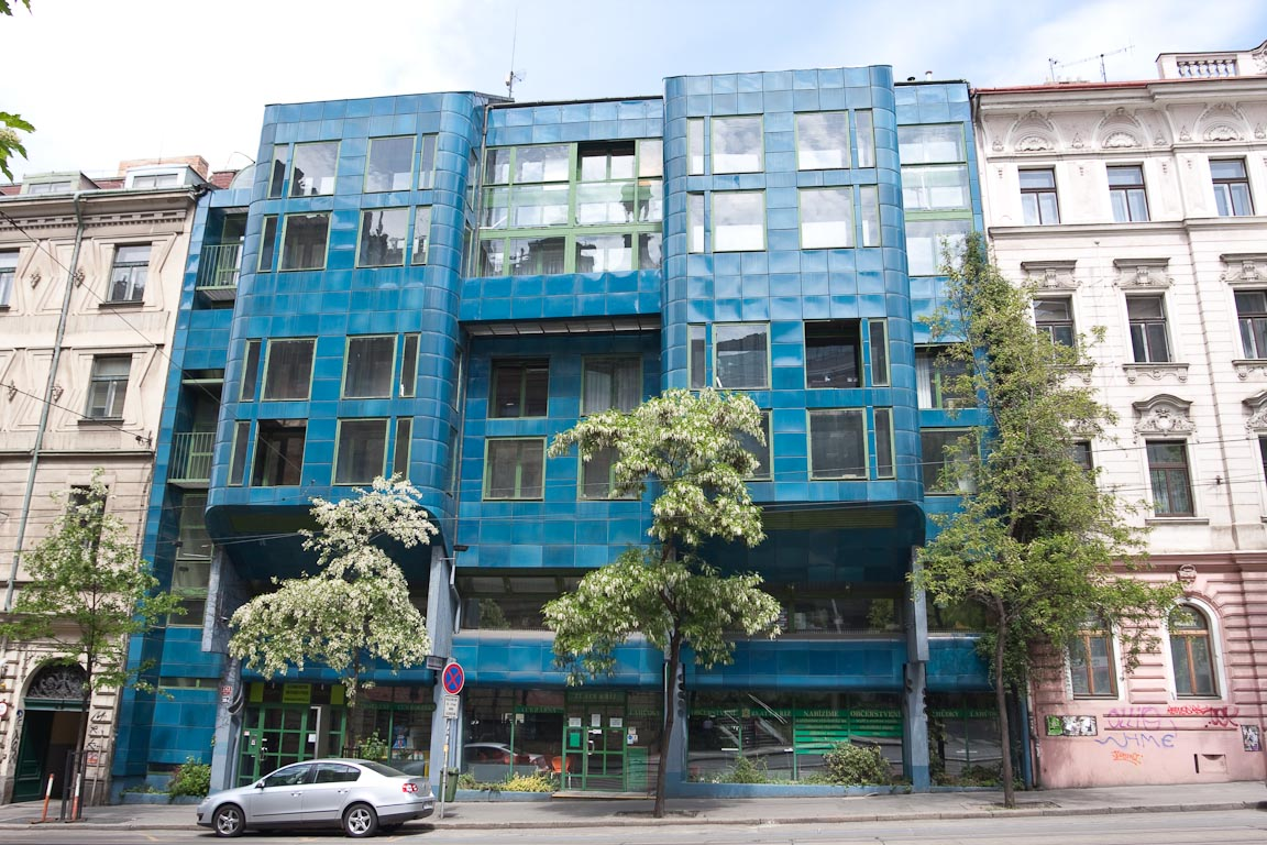 ul. Ječná,41; 08.05.2009